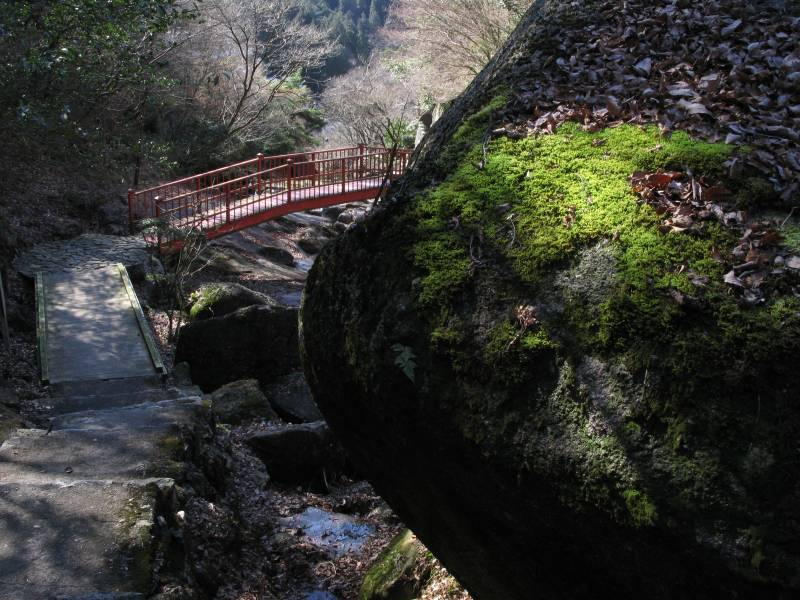 鬼岩の巨岩 (岐阜県可児郡御嵩町)